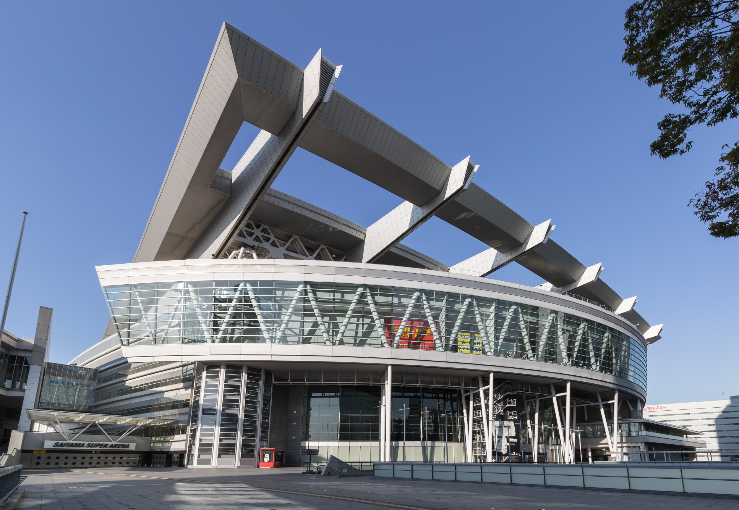 MAS・2000共同設計室（代表：日建設計）, ダン・マイス設計。